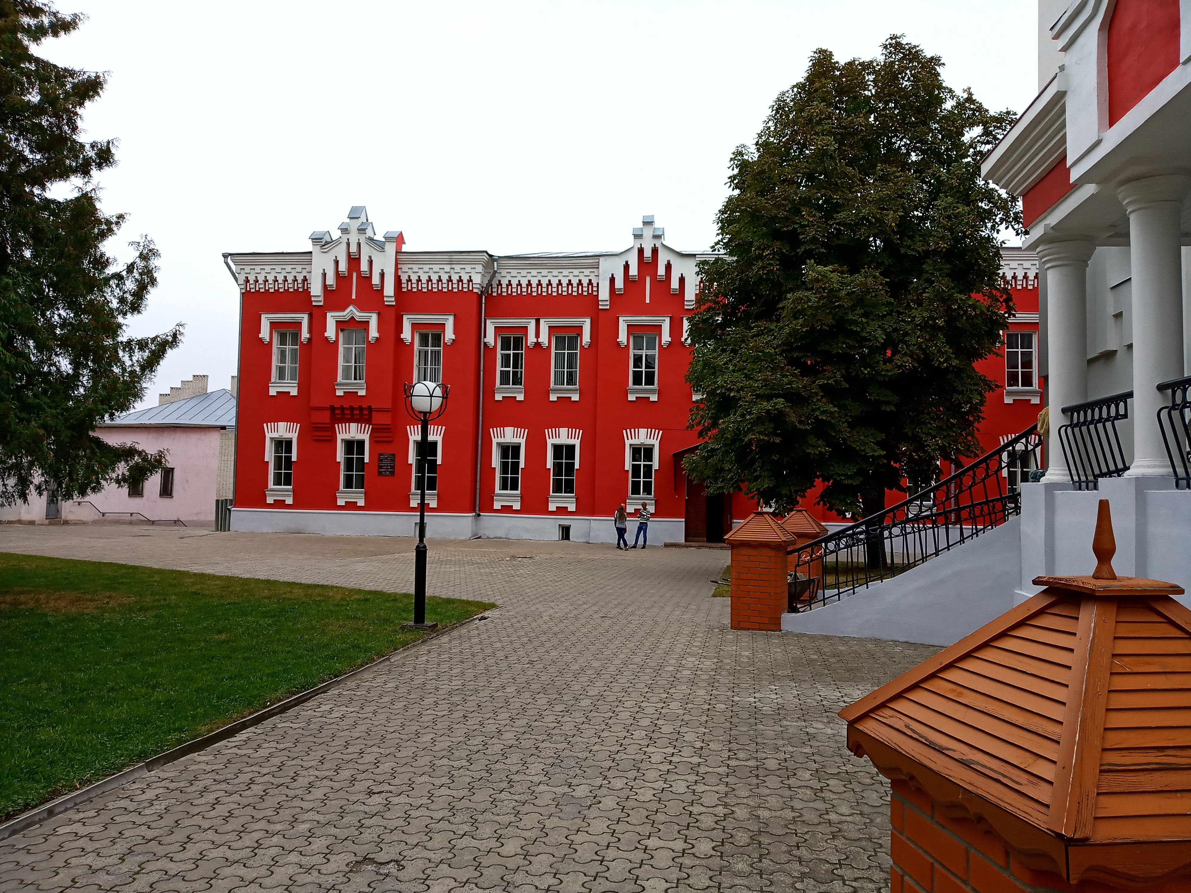 Пансіон Глухівської чоловічої гімназії, Глухів, вул. Києво-Московська, 24